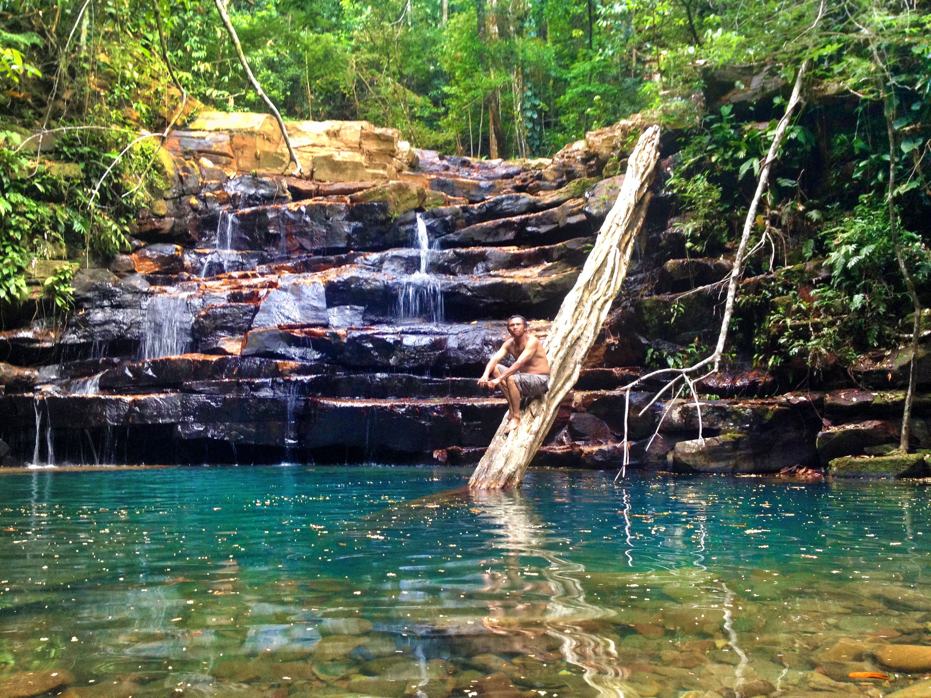 Nuestro guía Calixto nos llevó hasta una choza donde vive Lorenzo como se hace llamar, le pedimos que nos llevara a un salto de agua, tomo un machete y dijo que lo siguieramos, luego de una hora aproximadamente de caminata llegamos a un lugar paradisíaco, que a penas lo ví supe que solo Dios era capaz de hacer algo así, disfrute de un refrescante baño, aprendiendo de su cultura logre grabar "Wakupe Curumán" que significa gracias, no paré de repetirle una y otra vez a nuestros guías ese agradecimiento. Pero sobre todo a Dios, por la oportunidad. Jamás olvidaré ese lugar.